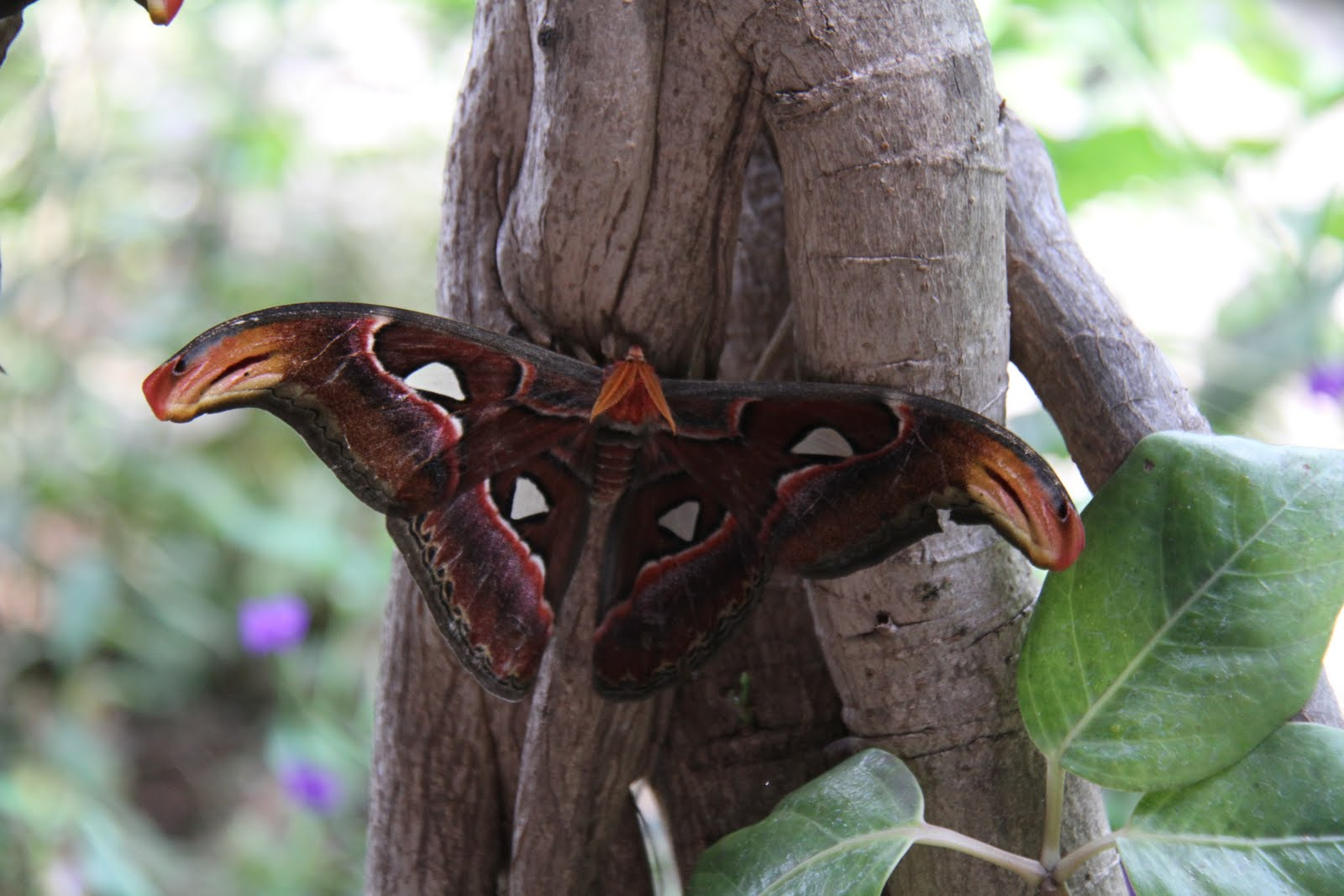 അറ്റ്ലസ് നിശാശലഭം